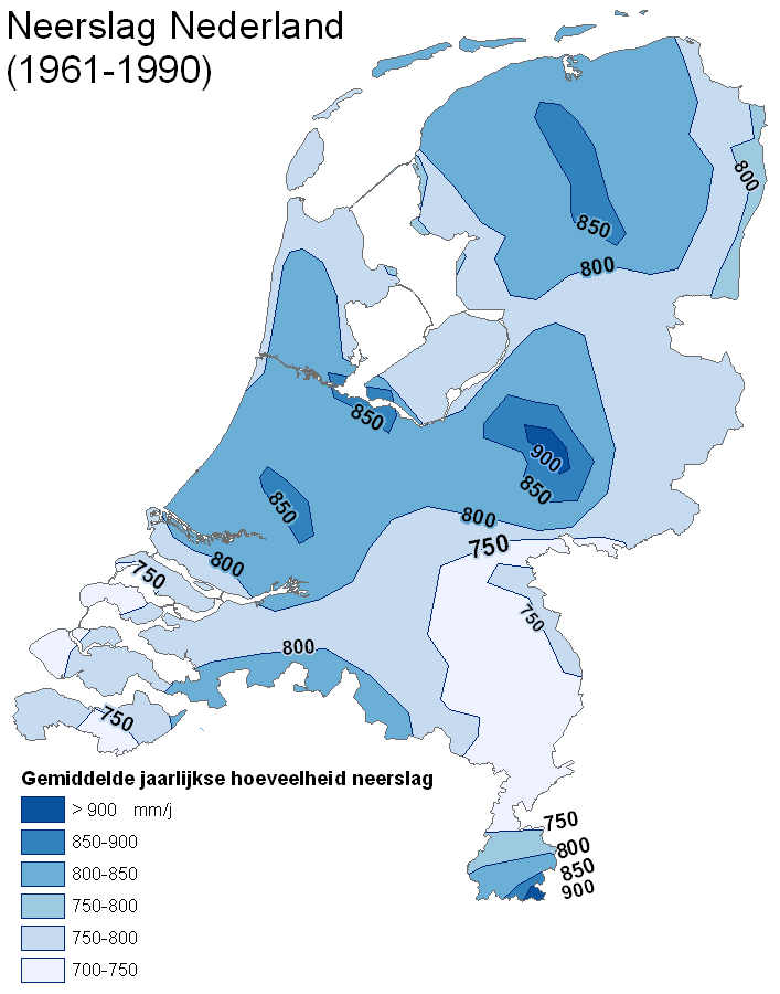 Neerslag in mm/jaar van Nederland. Bron neerslag data: De Grote Bosatlas, editie 52 (2000/2003). Dit is de isolijnen versie van: image: Nederland neerslag metingen.png